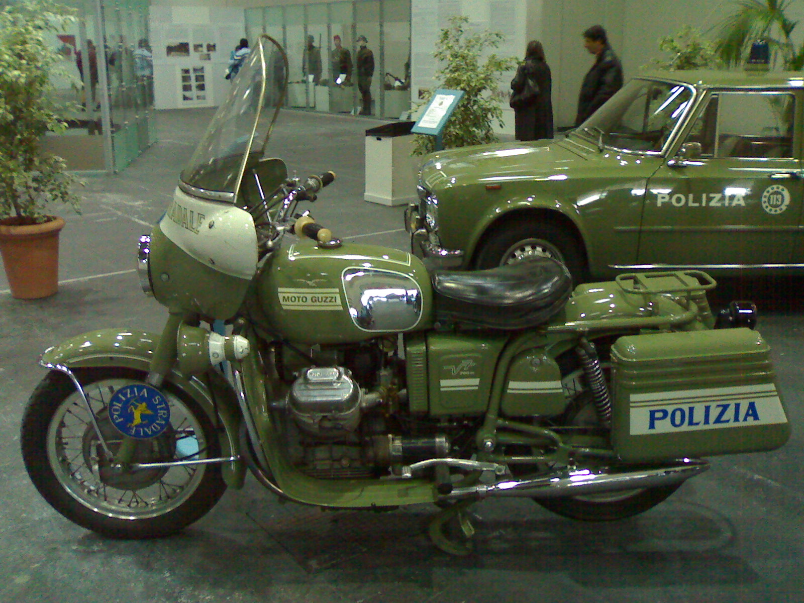 Moto_Guzzi_V7_700_Polizia Stradale Italiana